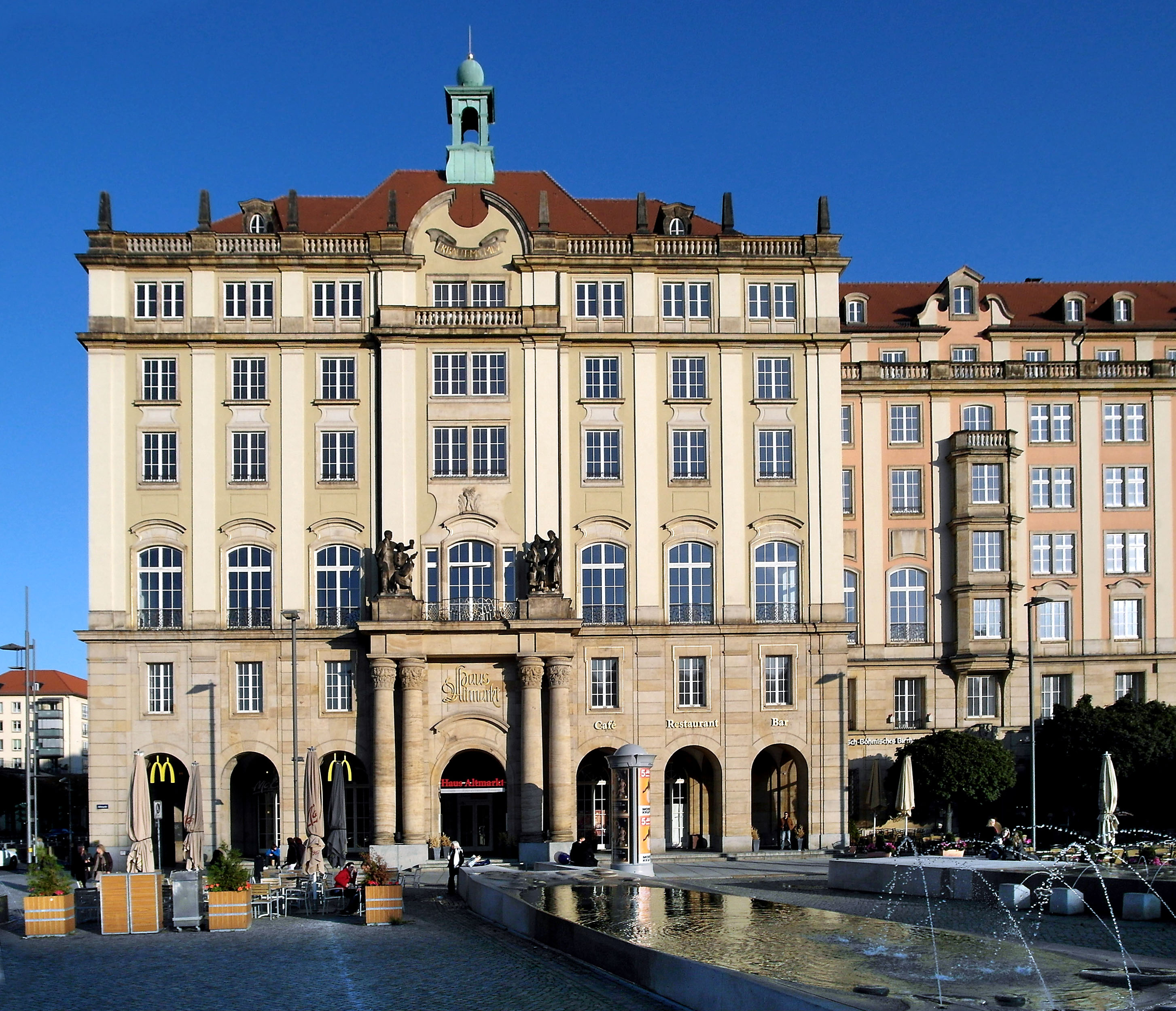 11.10.2012 01067 Dresden, Altmarkt: "Haus Altmarkt" (GMP: 51.049853,13.739170). Bis zum II. Weltkrieg stand hier das Im Oktober 1888 eröffnete "Residenz-Cafe", das den Bomben zum Opfer fiel. Eine Wiederbelebung der Kaffeehaustradition erfolgte in den 1950er Jahren mit dem Bau des Restaurantkomplexes "Haus Altmarkt". Mehr als ein halbes Jahrhundert später entstanden die heutigen Wasserspiele auf dem Altmarkt (GMP: 51.049855,13.738658). Die Platzgestaltung einschließlich Wasserbecken geht auf die Arbeit des Hamburger Büros WES & Partner mit dem Landschaftsarchitekten Hinnerk Wehberg zurück. Am 09.07.2009 wurden die Wasserspiele am Altmarkt erstmals in Betrieb genommen (und versiegten nach drei Tagen erst mal wieder). Zusammen sind es fünf neue Wasserbecken. Aus insgesamt 39 Düsen auf und neben den Becken aus chinesischem Granit (weil er dem Sandstein ähnlich sieht) kommt das Wasser. Die Brunnen haben eine speicherprogrammierte Steuerung. So können die Düsen einzeln und in unterschiedlicher Stärke eingestellt werden. Für jedes Becken soll es fünf Programme geben. [SAM1872.JPG]20121011060DR.JPG(c)Blobelt